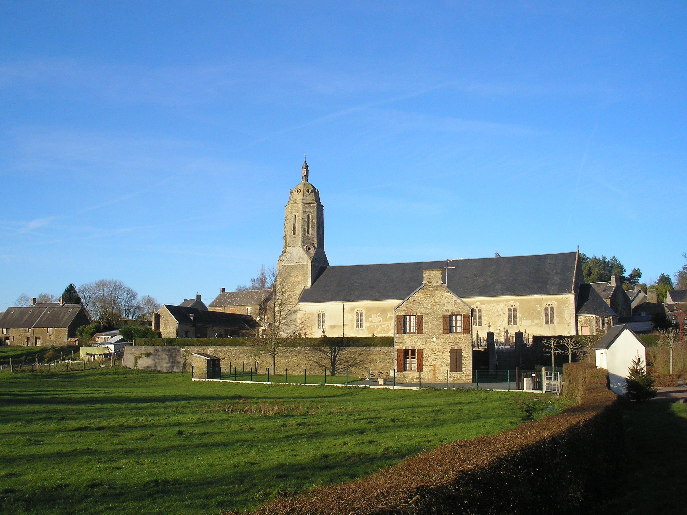 Sallen (Normandie, France). L'église Saint-Matthieu.